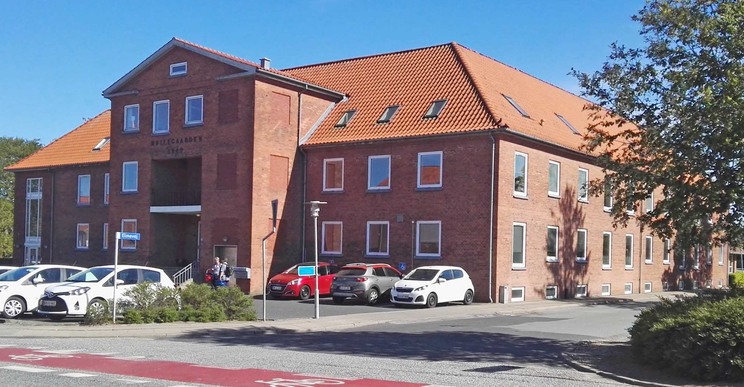 Møllegården i Brovst, tidligere plejehjem, nu administrationsbygning